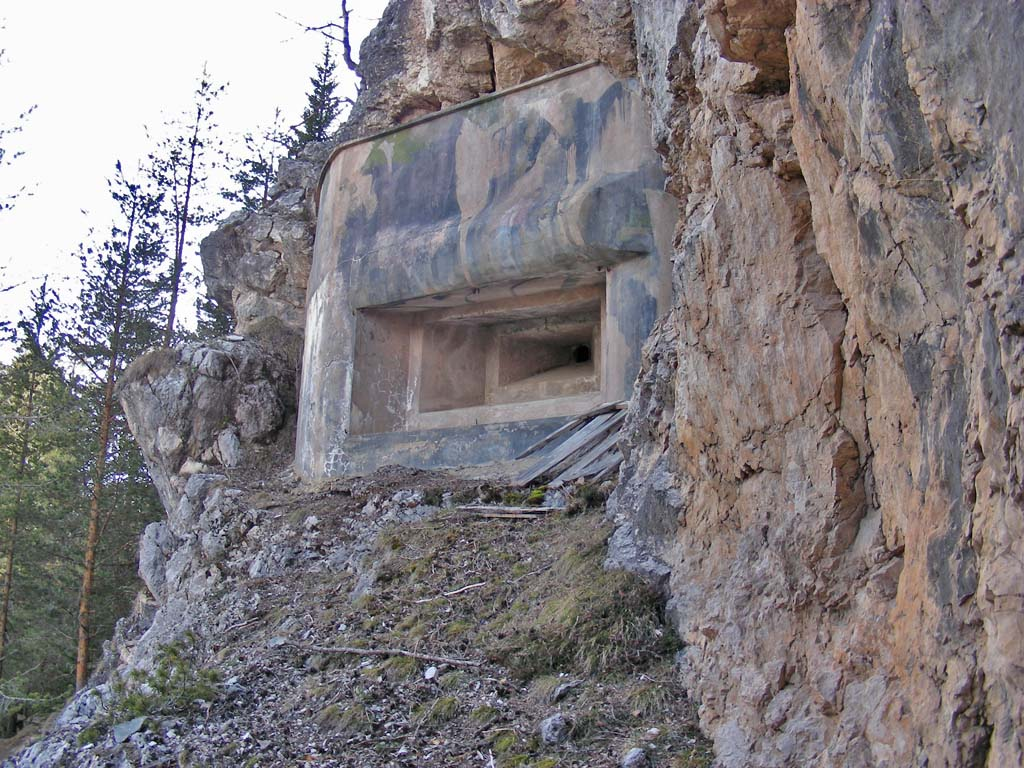 Maschinengewehrscharte eines kavernierten Vallo-Alpino-Werkes oberhalb der Cima Banche